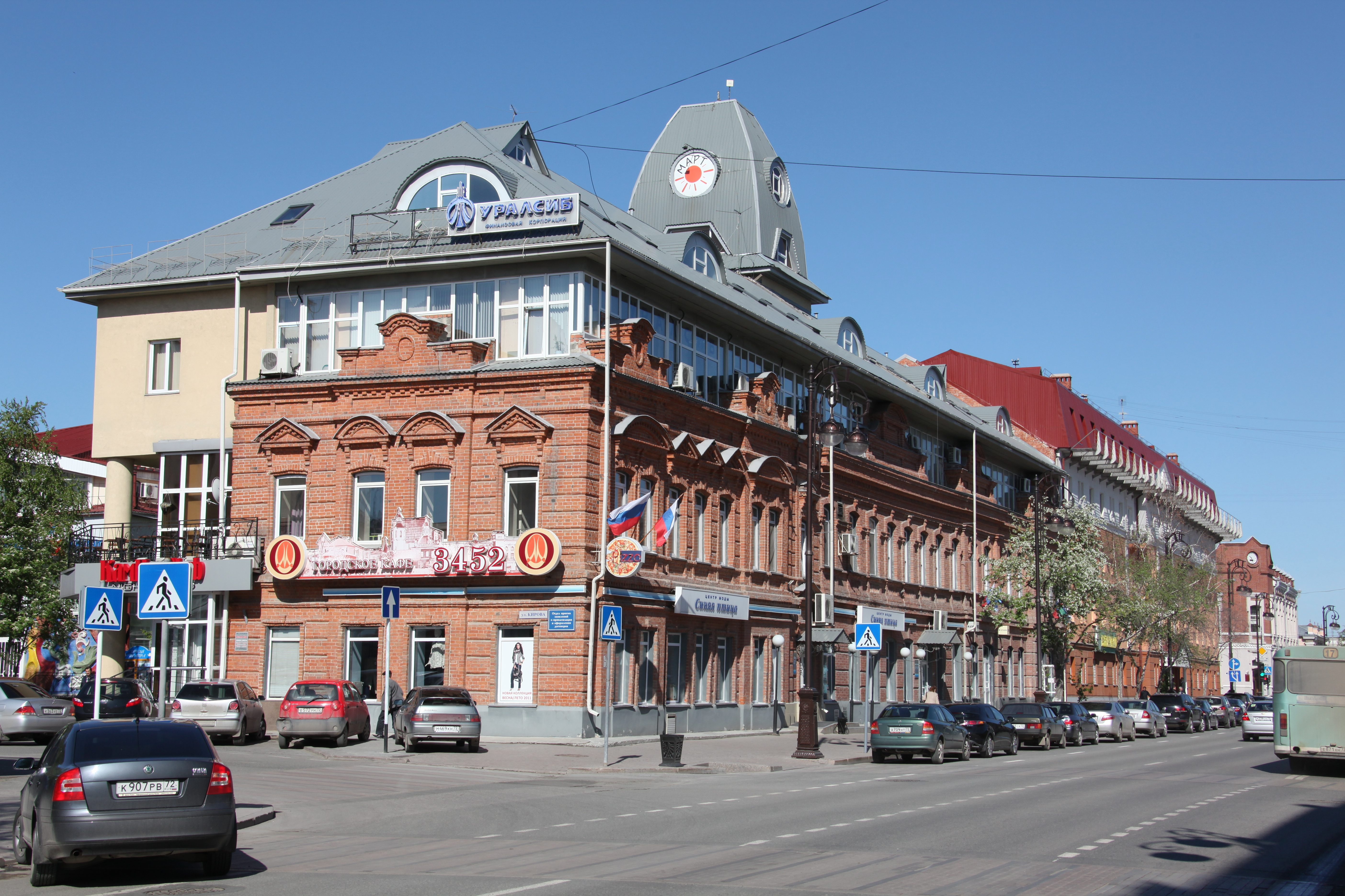 Strato Respubliko. Tjumeno, Rusio.